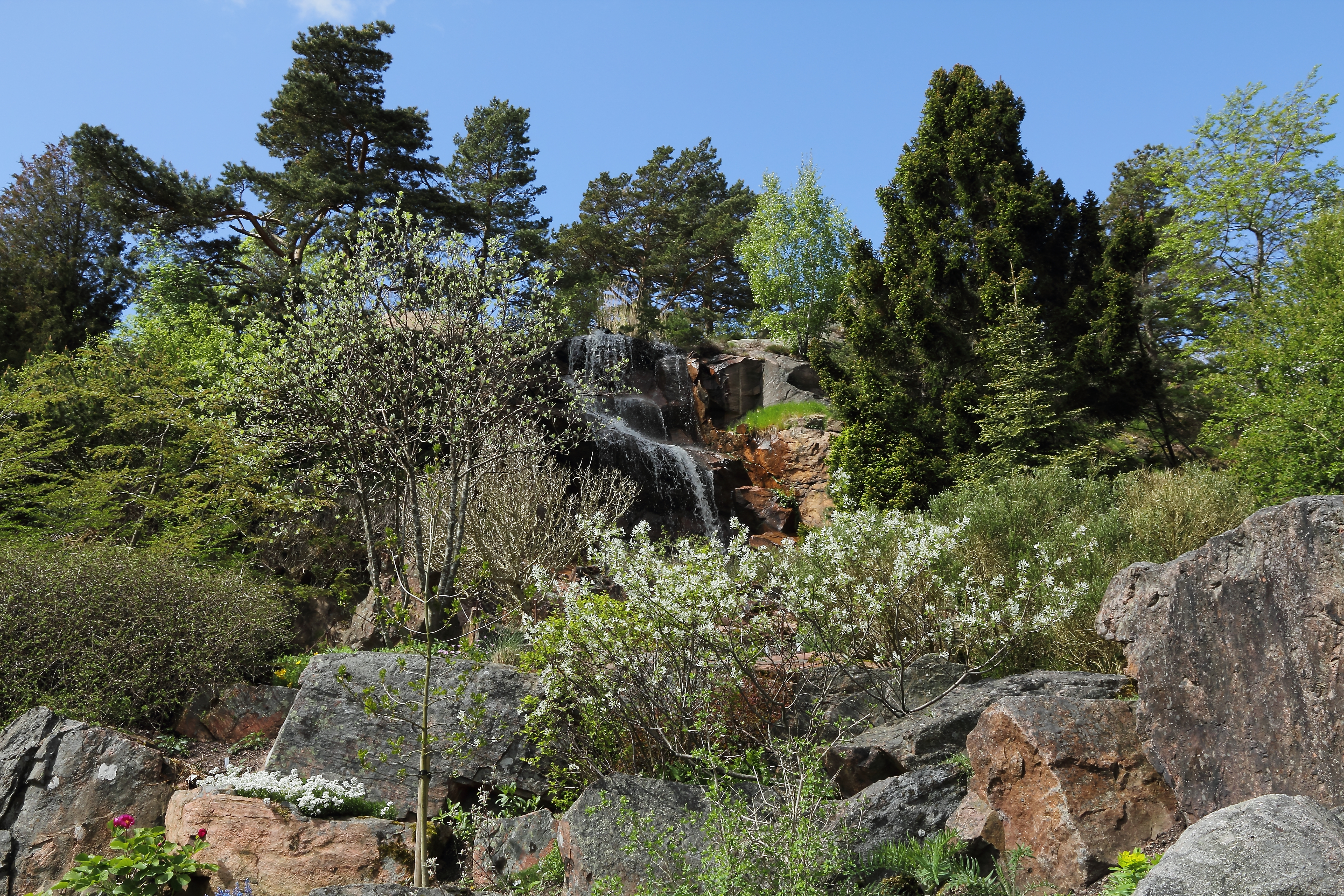 Göteborgs Botaniska Trädgård.